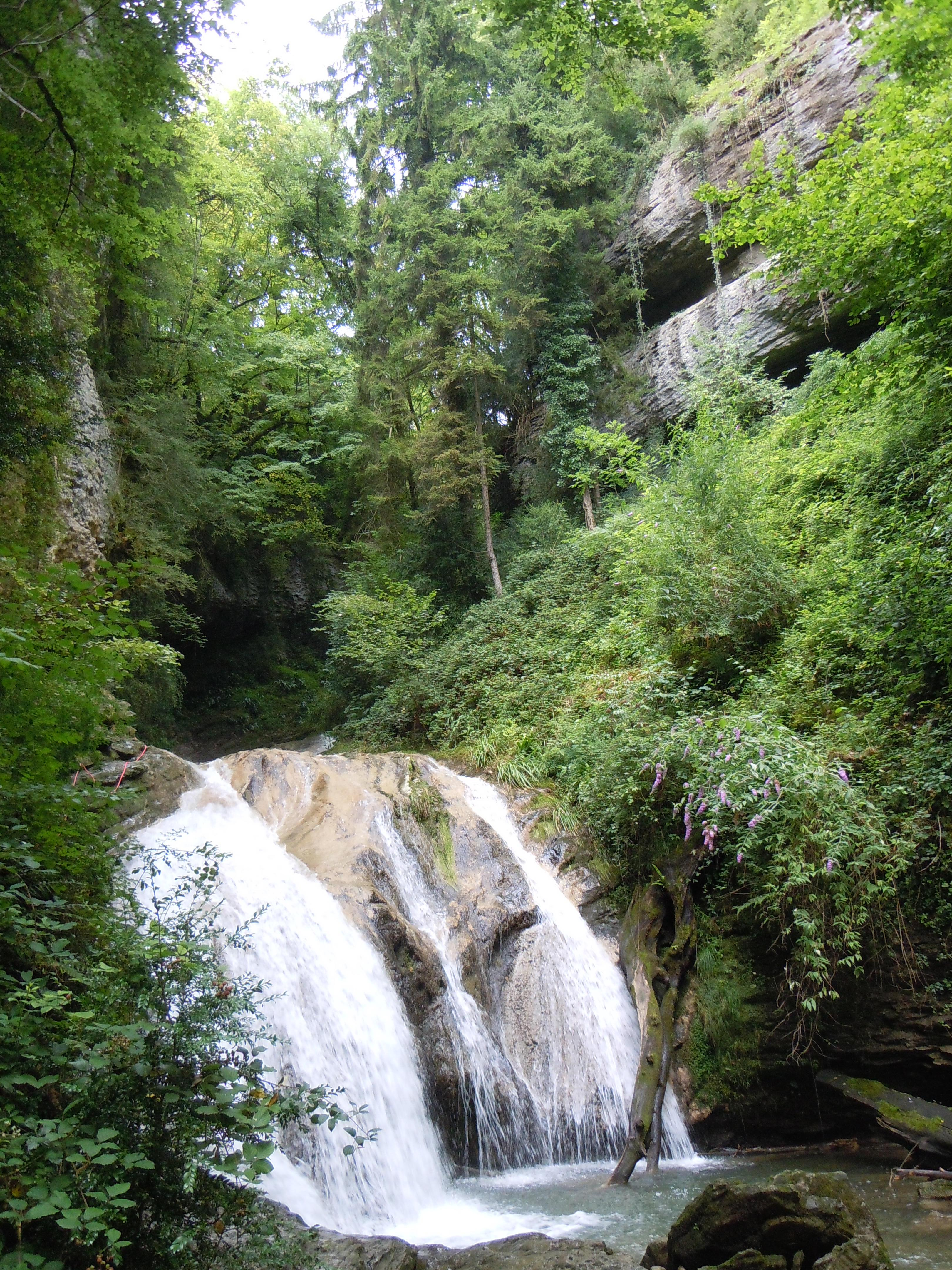 Cascade du Grenand - La Bridoire - Savoie - Fance